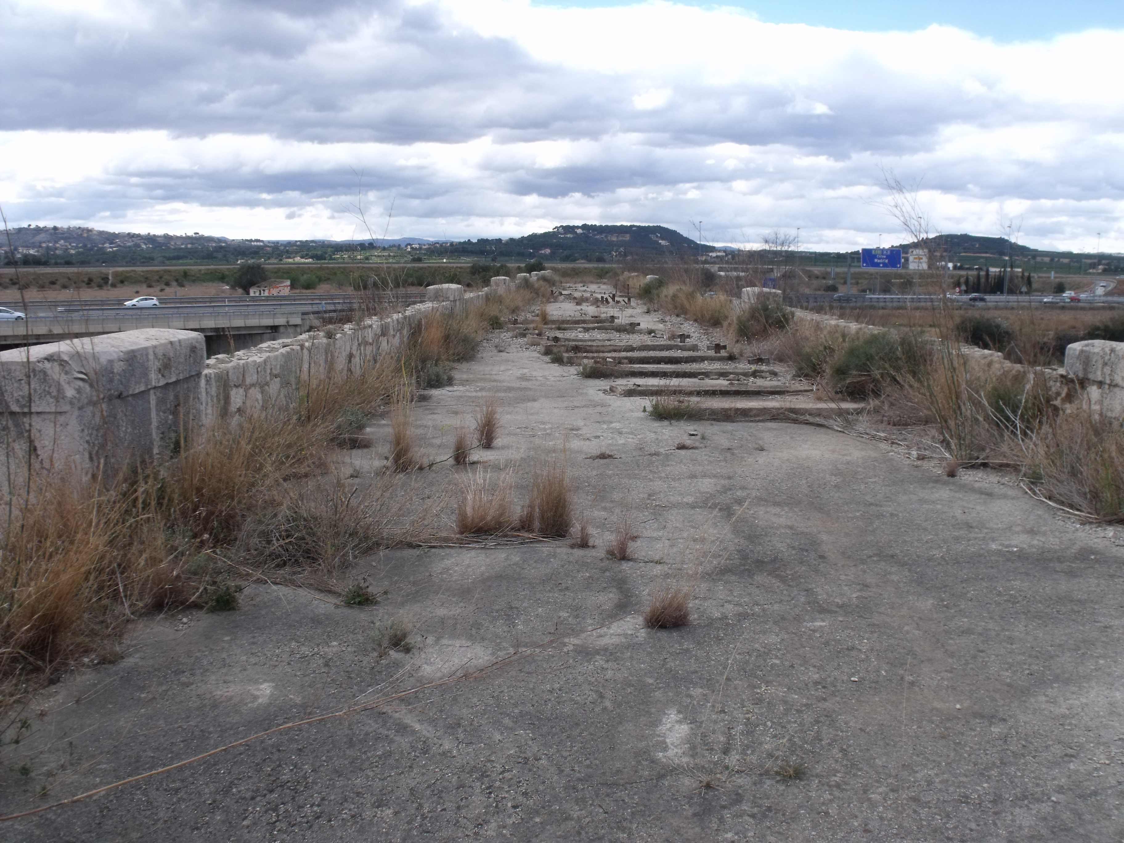 Puente nuevo en la A3 desde el puente viejo en la rambla del Poyo.